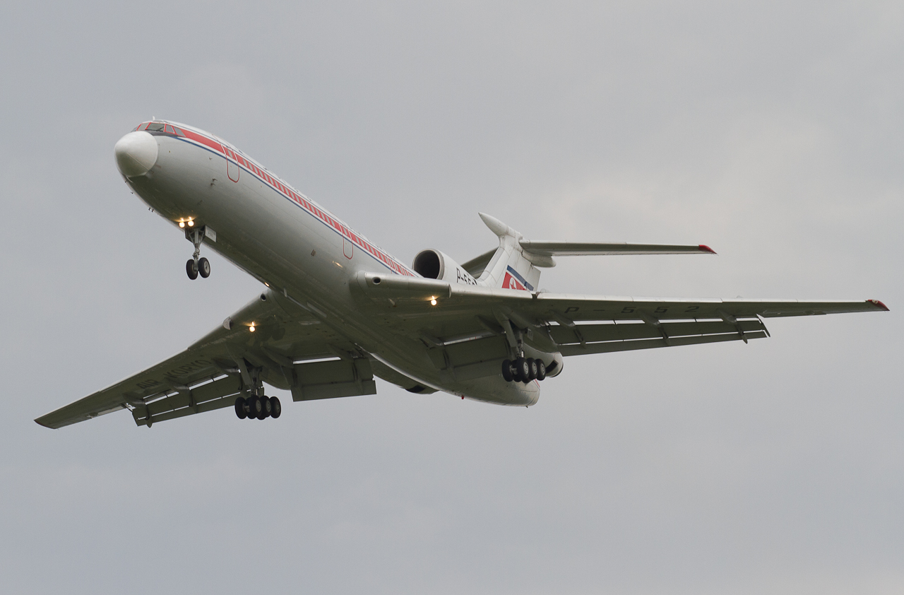 _MG_0207